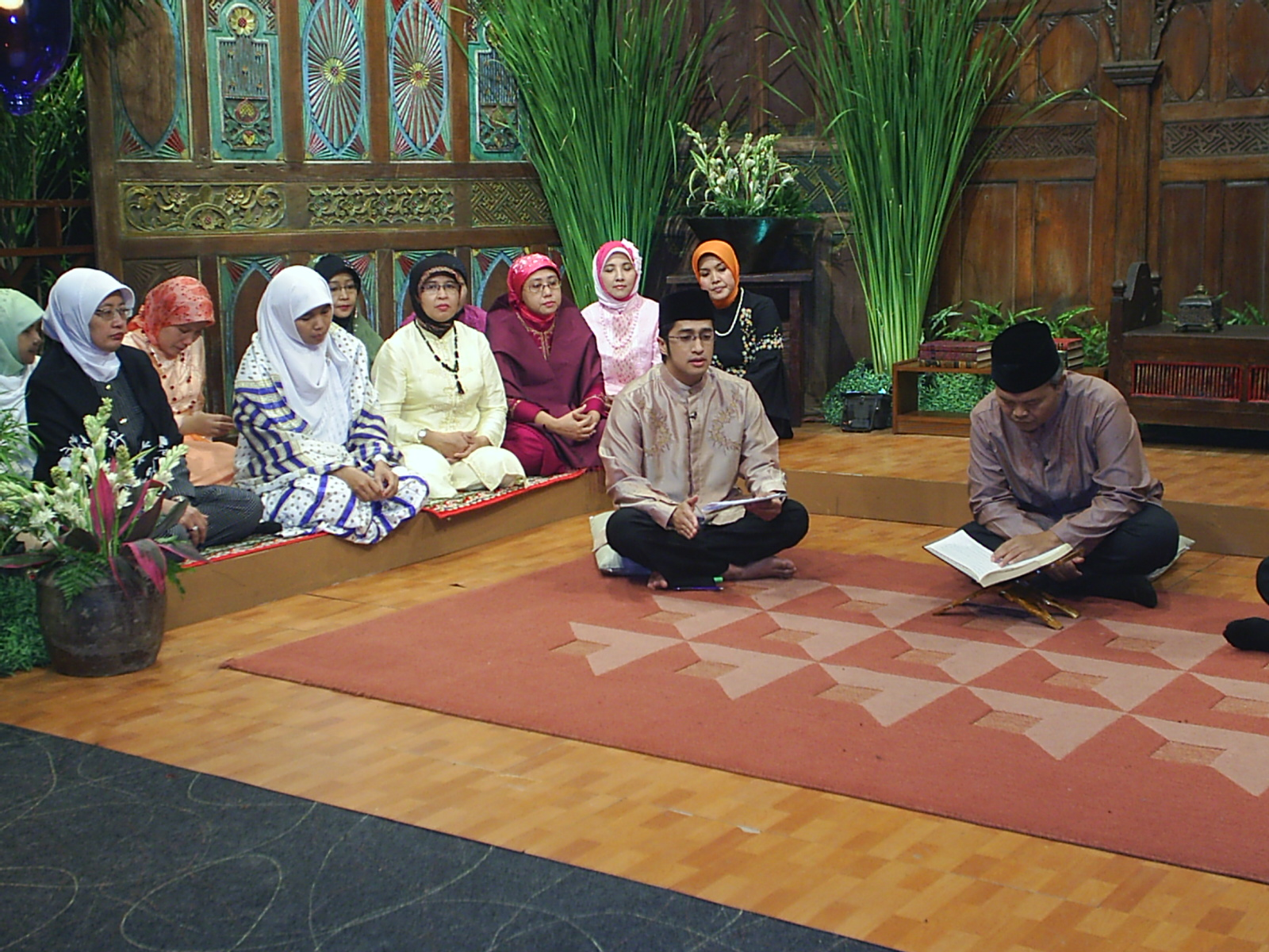 Pembawa acara Irfan Hakim dan Narasumber tetap Hidayat Nur Wahid sedang mempersiapkan diri untuk rekaman Titian Semangat (2007)